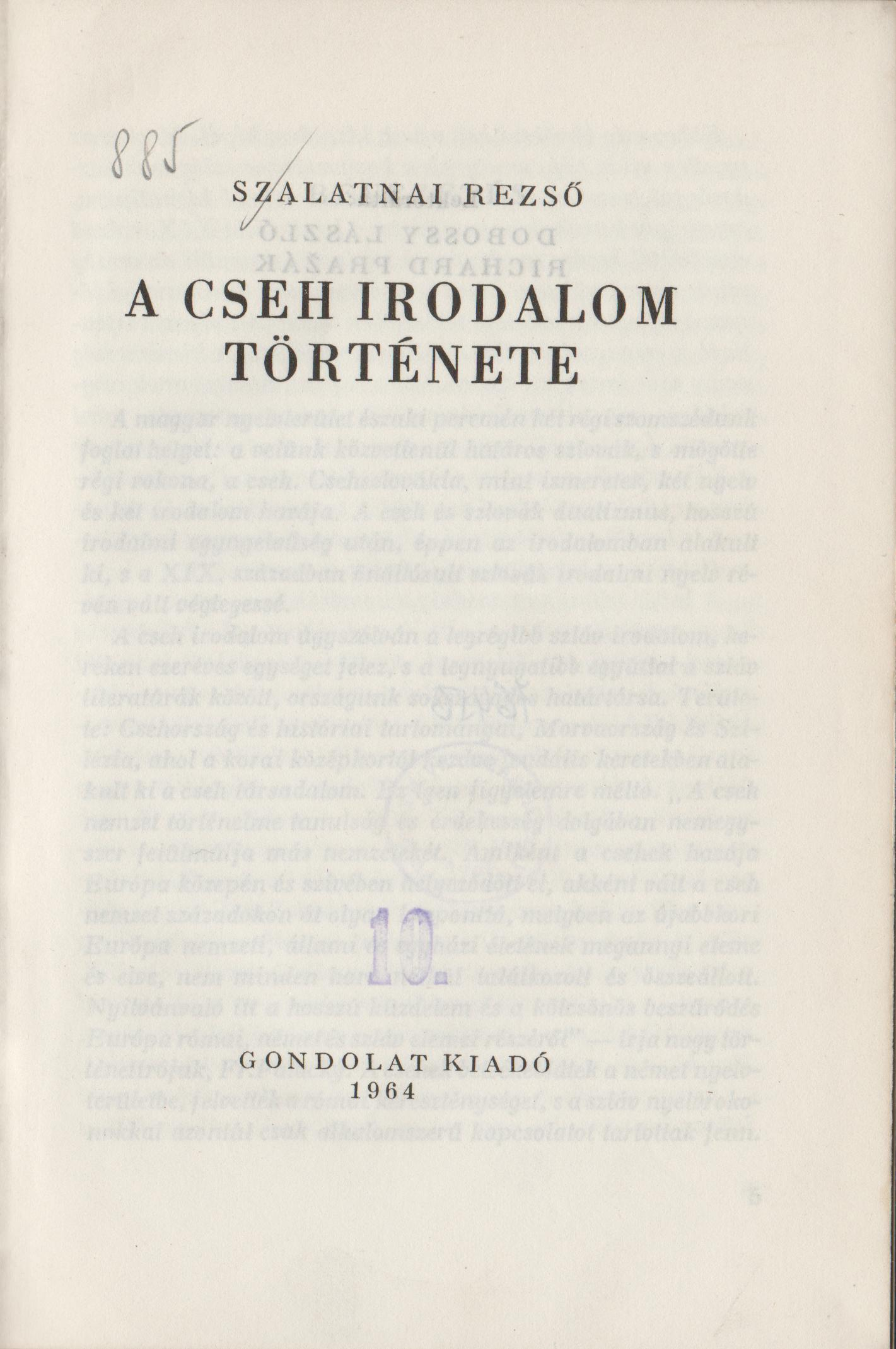 Az adott mű címlapja.